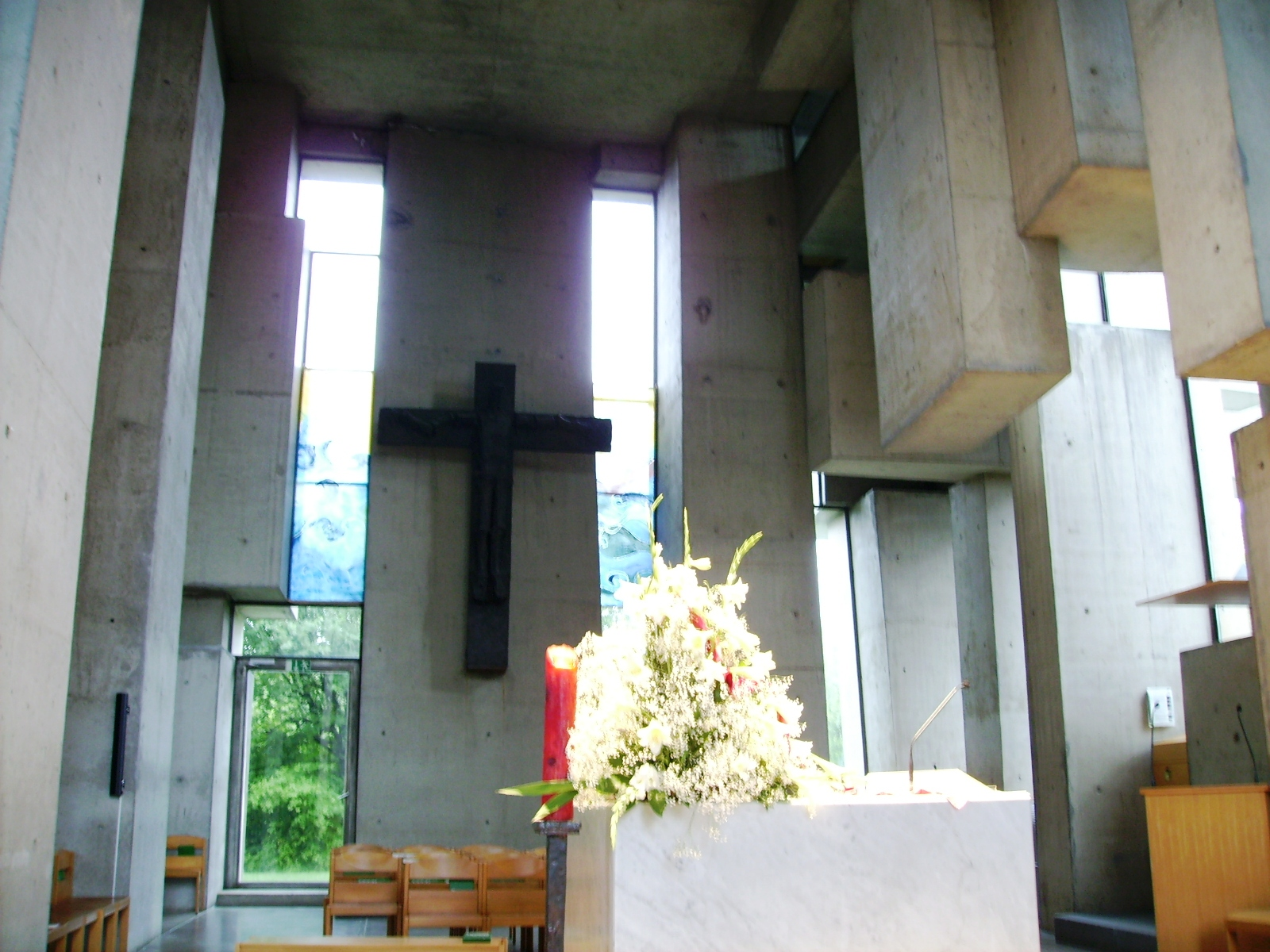 Fritz Wotruba. Dreifaligkeitskirche in Wien-Mauer, erbaut 1974 bis 1976. Sakraler Zyklopenbau aus gewaltigen Betonquadern.